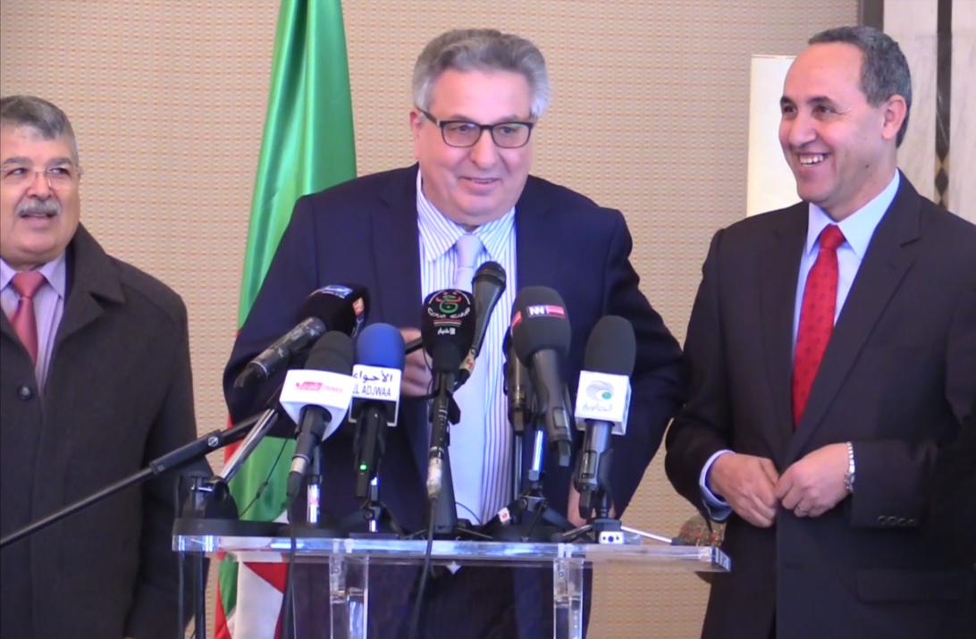 De gauche à droite : Mohamed Benamar Zerhouni, Conseiller du Président - Fayçal Benkalfat - Azzedine Mihoubi, Ministre de la culture